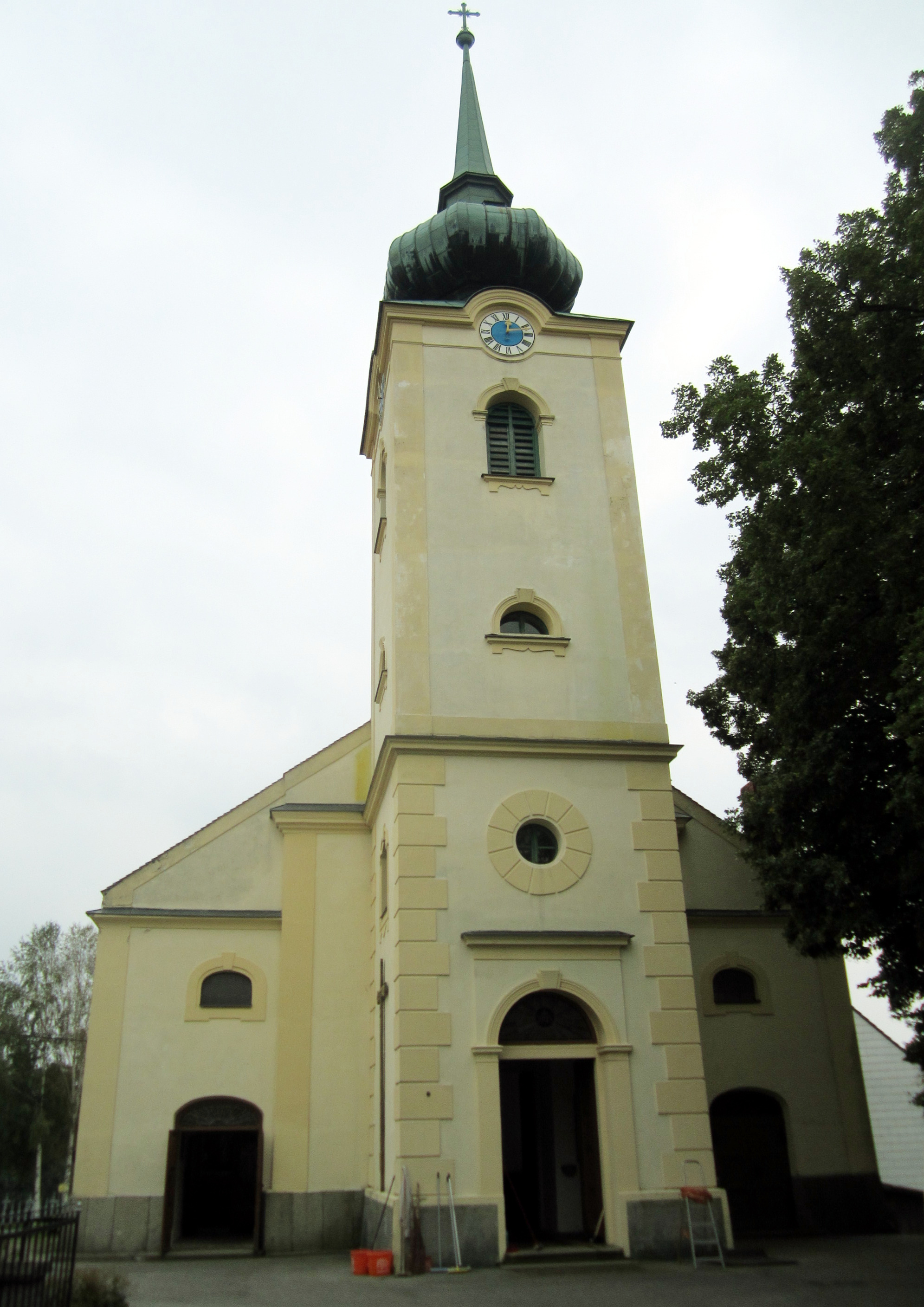 1785 anlässlich der Pfarrerhebung Verlängerung der damals einschiffigen Kirche; heutiger Bau im Wesentlichen von 1936, vorgestellter Westturm von 1903. Object location48° 56′ 59.53″ N, 15° 18′ 29.34″ E